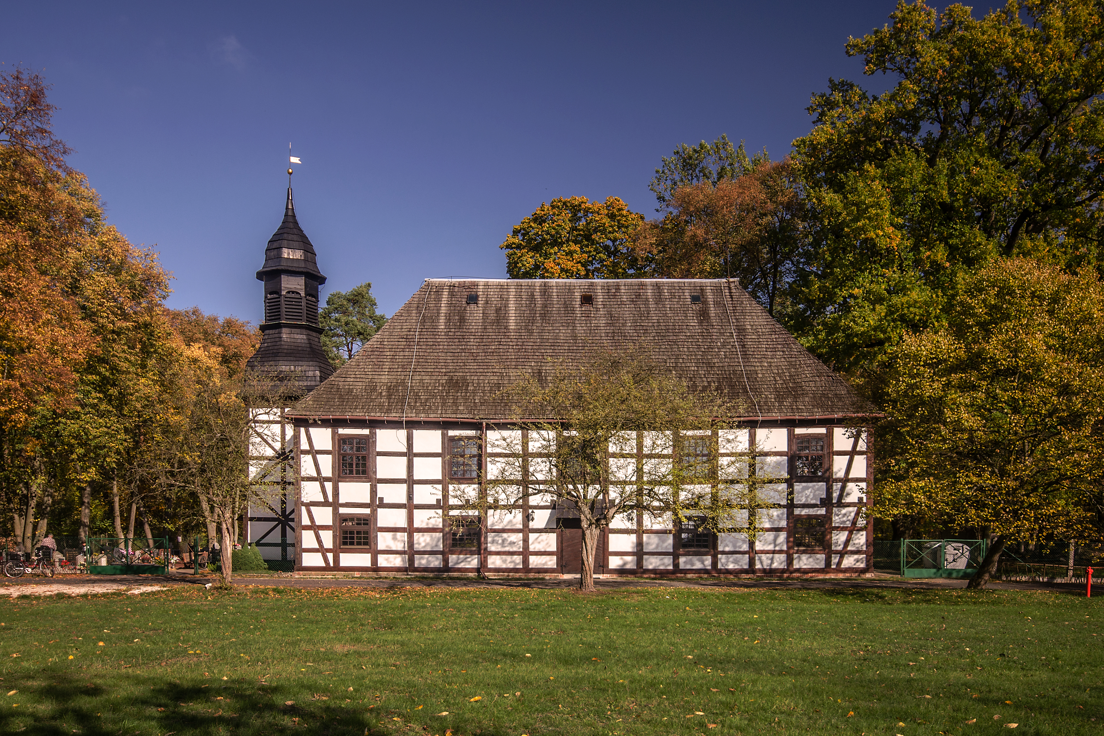 Radomierowice, kościół ewangelicki, ob. rzym.-kat. fil. p.w. św. Wniebowzięcia NMP, 1786-1790, 1866